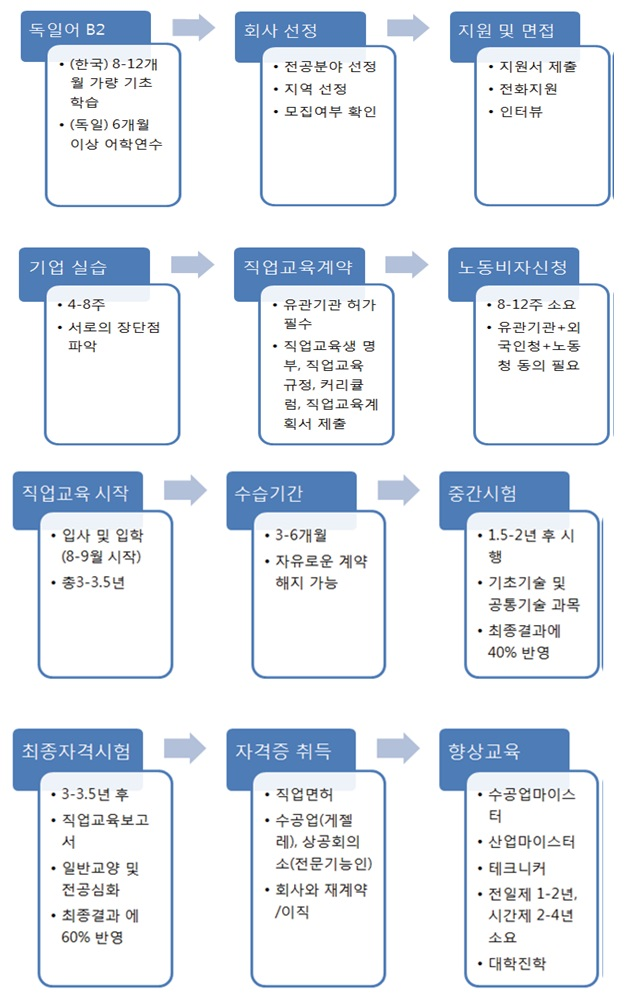 독일직업교육과정